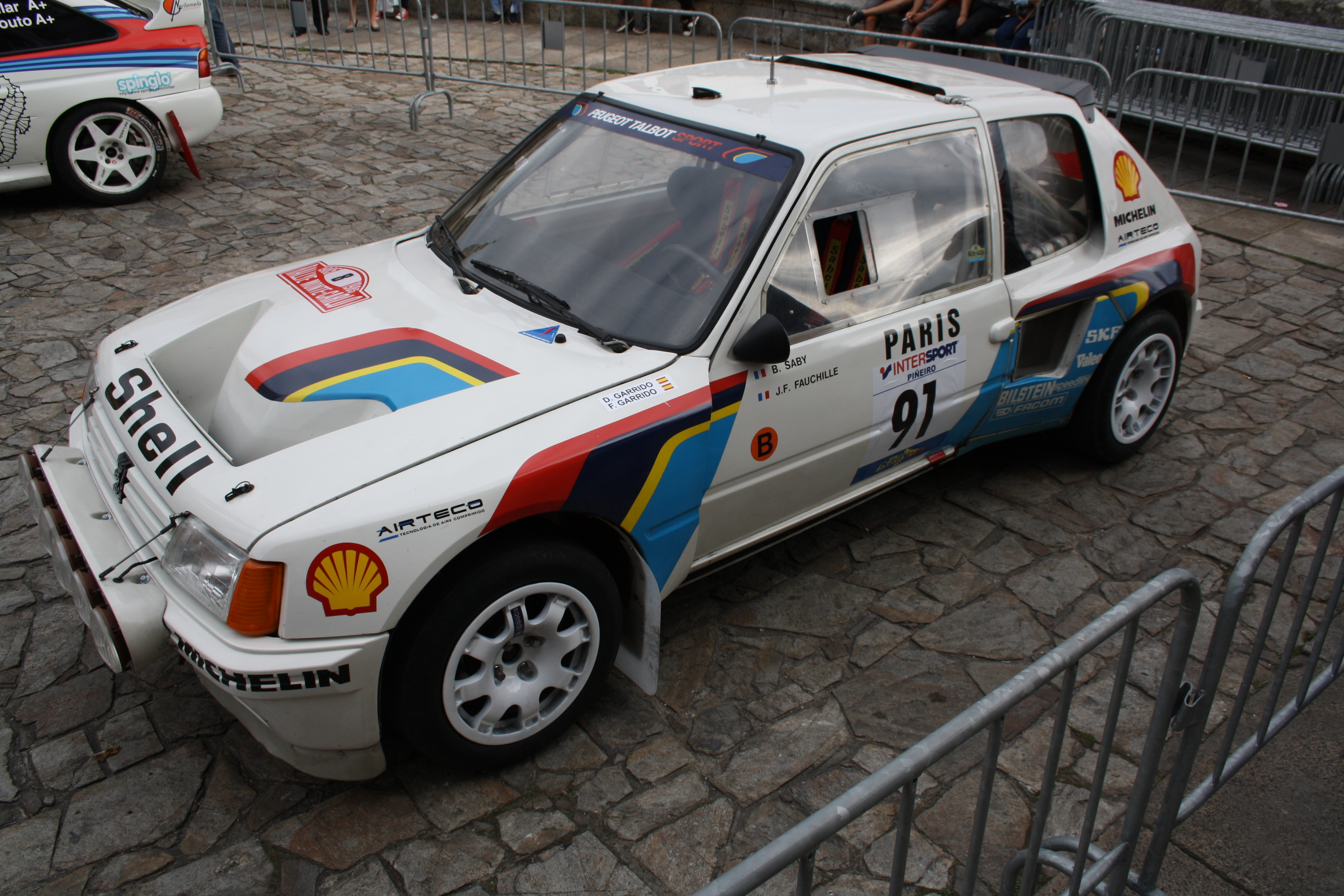 Rally de Galicia Histórico 2012